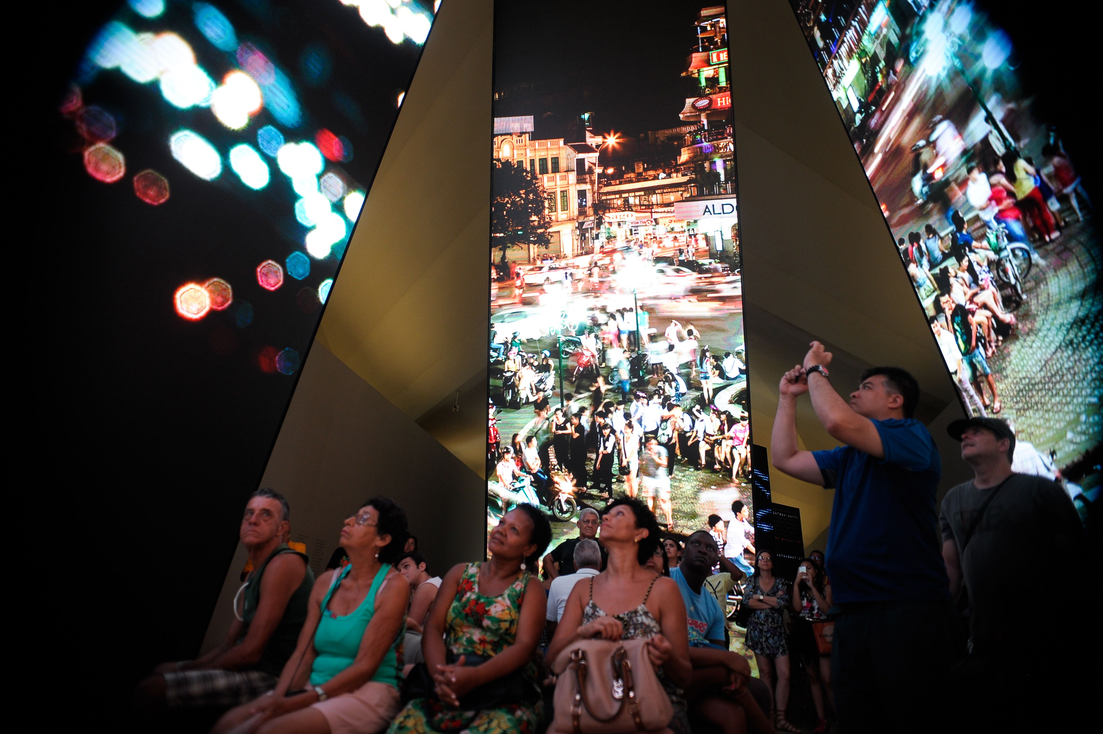 Rio de Janeiro - Para celebrar a inauguração do Museu do Amanhã, na Praça Mauá, aberto pela primeira vez ao público neste fim de semana, a Prefeitura do Rio realiza o Viradão do Amanhã